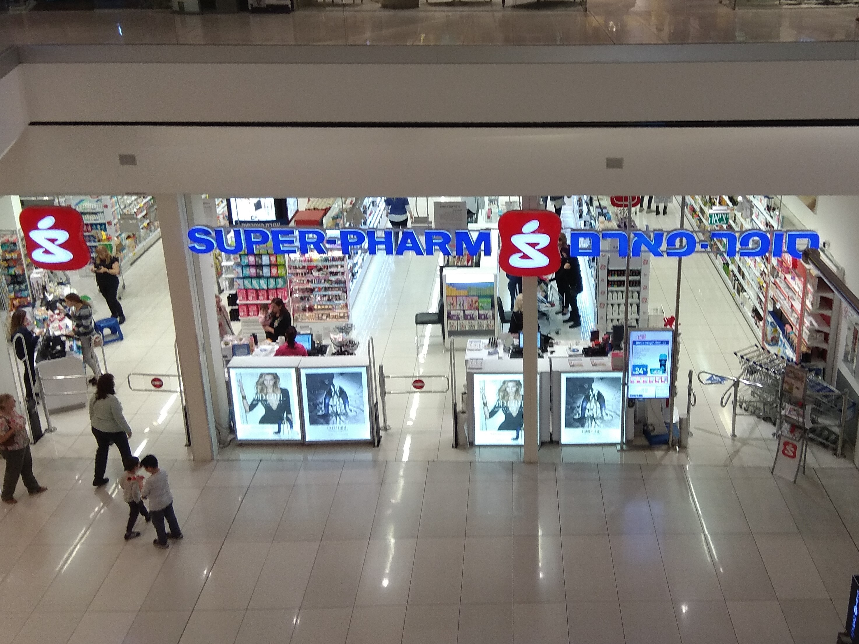 סניף סופר פארם